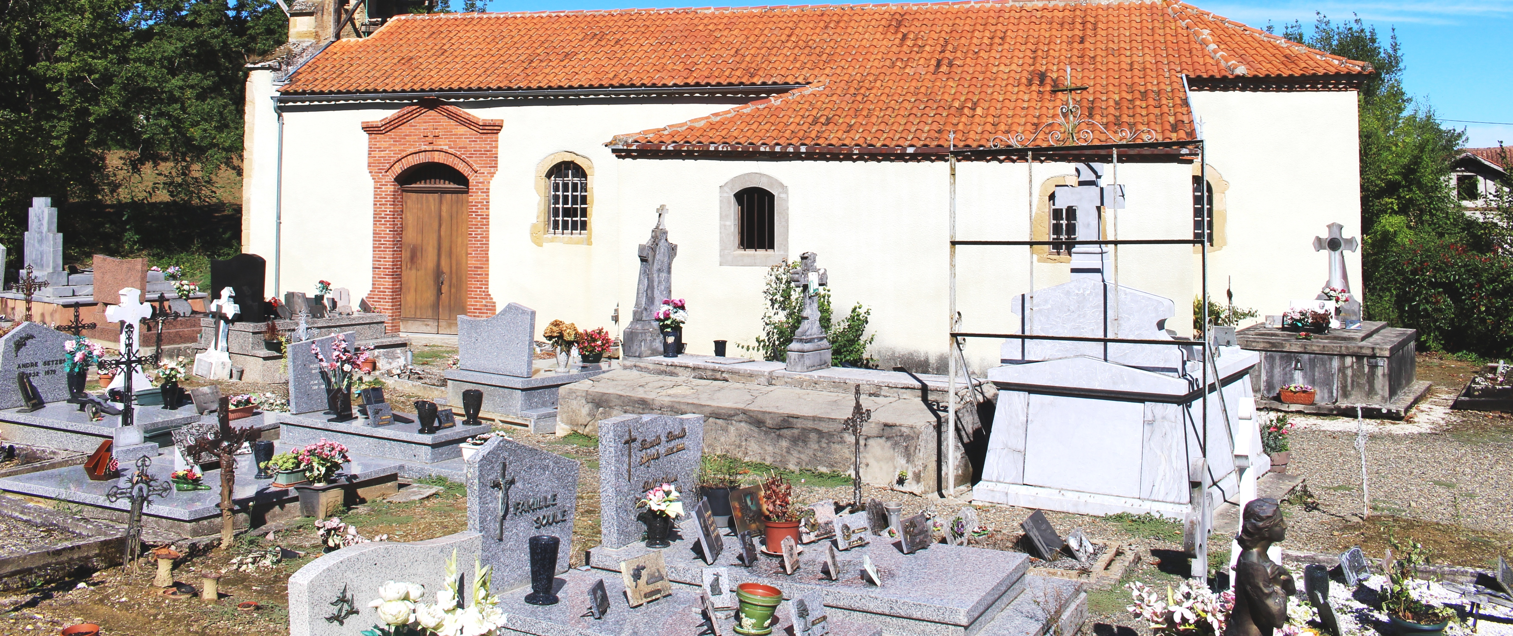 Cimetière de Buzon (Hautes-Pyrénées)